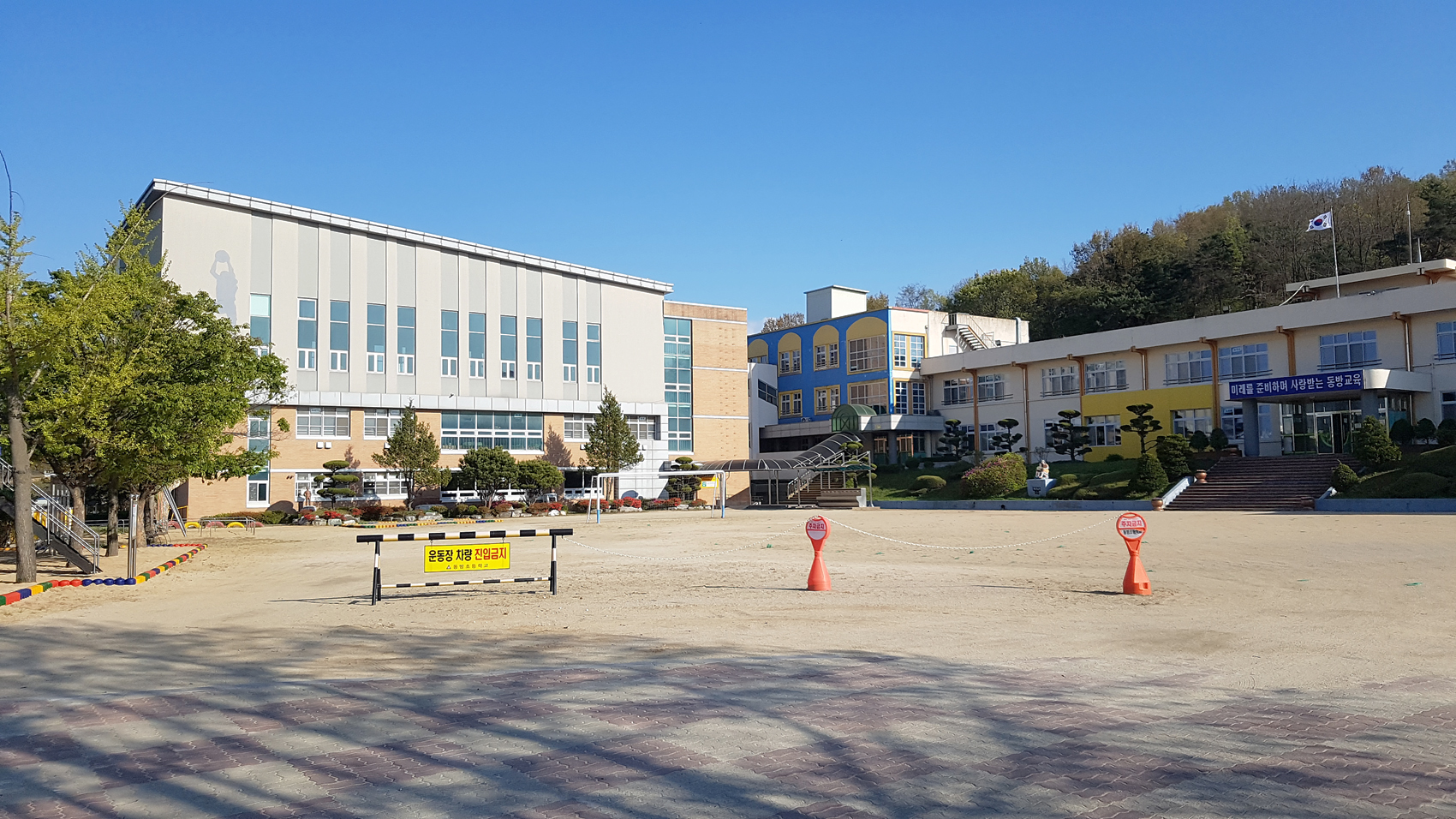 동방초등학교